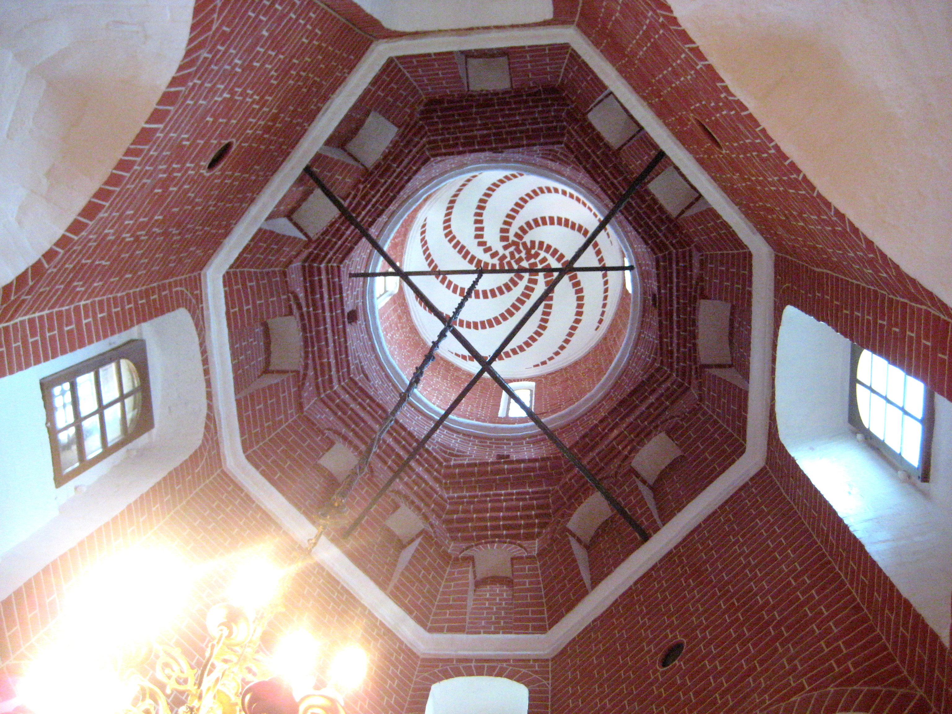 Храм Василия Блаженного